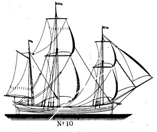 Sammanställning av fartygstyper av Fredrik Henric af Chapman som beskrivs i planschverket "Architectura Navalis Mercatoria", utgiven 1768. Originalbeskrivning: "Visar utseendet av de flere slags Taklingar, som mäst brukas på Skepp och andre fartyg; hvaraf Fartygen gemenligen få Namn. 1. Fregat 2. Snaw 3. Kitz eller Hukare 4. Brigantin eller Brigg 5. Billender 6. Scooner 7. Hållensk fisk Hukare 8. Hartlooper Galleoth 9. Galleass 10. Kreyare 11. Hukare Jagt 12. Jagt 13. Chalk 14. Hoy, Engelsk 15. Engelsk Cutter 16. Tartane 17. Spehl Jagt 18. Fransk Skjeps-båt med latins segel 19. Svensk Skjeps-båtmed Jagtsegel 20. Engelsk Deal Cutter med 3:ne sprisegel 21. Slup med 2:ne Sprisegel 22. En Britonsk Fisk-båt 23. En skjeps-Julle med sprisegel och stagfock 24. En Stockholms Lots-båt Visar allahanda Fartygs åtskillige Taklings-sätt, och är större delen af dessa Taklingar sådane, som Caracterisera fartygen, och finnas upteknade i den tabell som åtföljer Boken. Distancen emellan de små Verticala Linierne, som på N:o 1 äro teknade med a och b, utmärka Fartygets bredd. Råerne suponeras vara så brassade, at de göra en angel af 60° med Fartygets Medellinia, hvaraf följer, at Råernes värkeliga längder äro dubbelt större än hvad de synas på Ritningarne, och äro alla dessa Takel-Ritningar efter en och samma Skala, hvilken finnes upritad på samma Plåt."